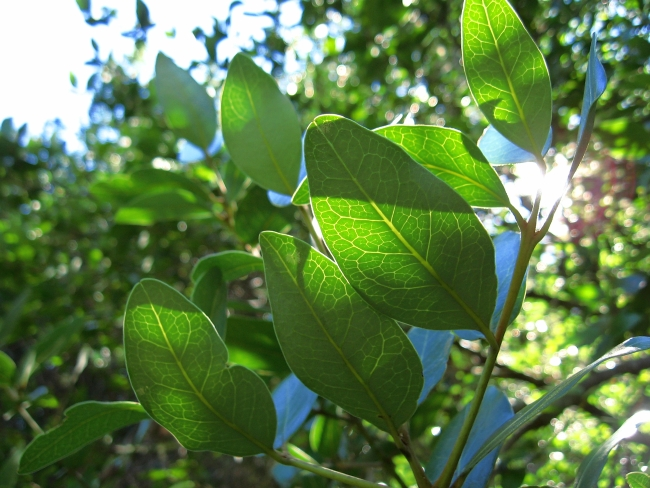 Beilschmiedia berteroana (Gay) Kosterm., Belloto del Sur